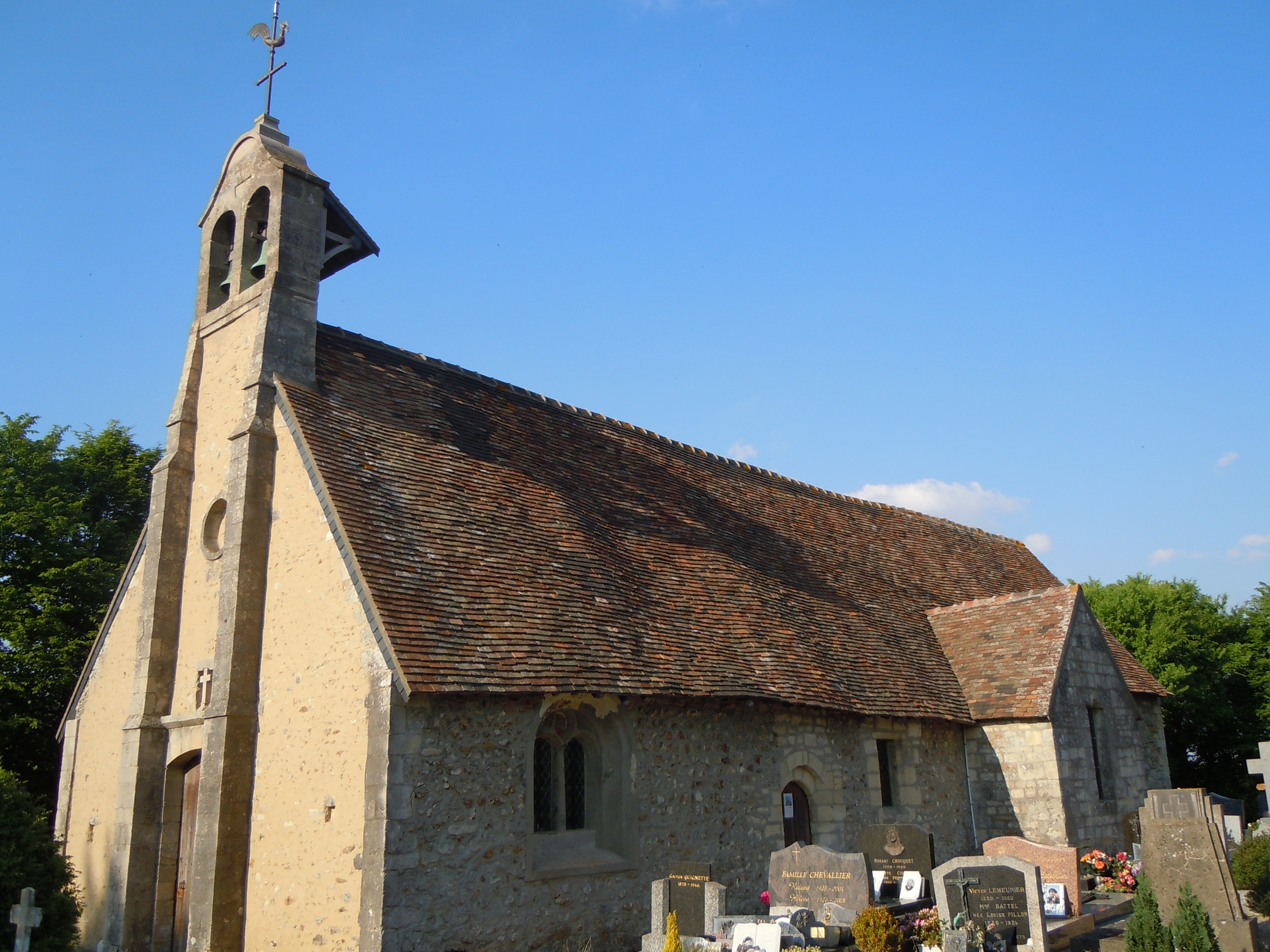 Auberville (Église Notre-Dame) - Calvados - France